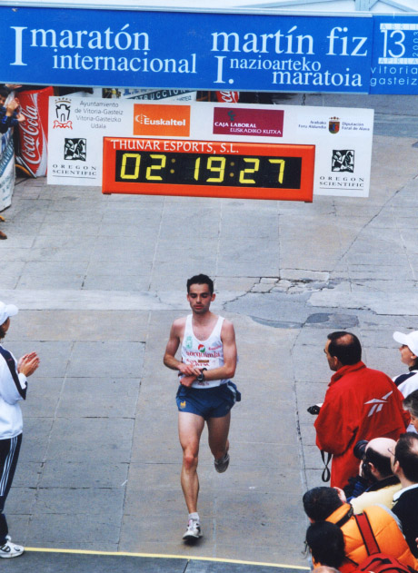 Iván Sánchez llegando a la meta en el I Maratón Martín Fiz